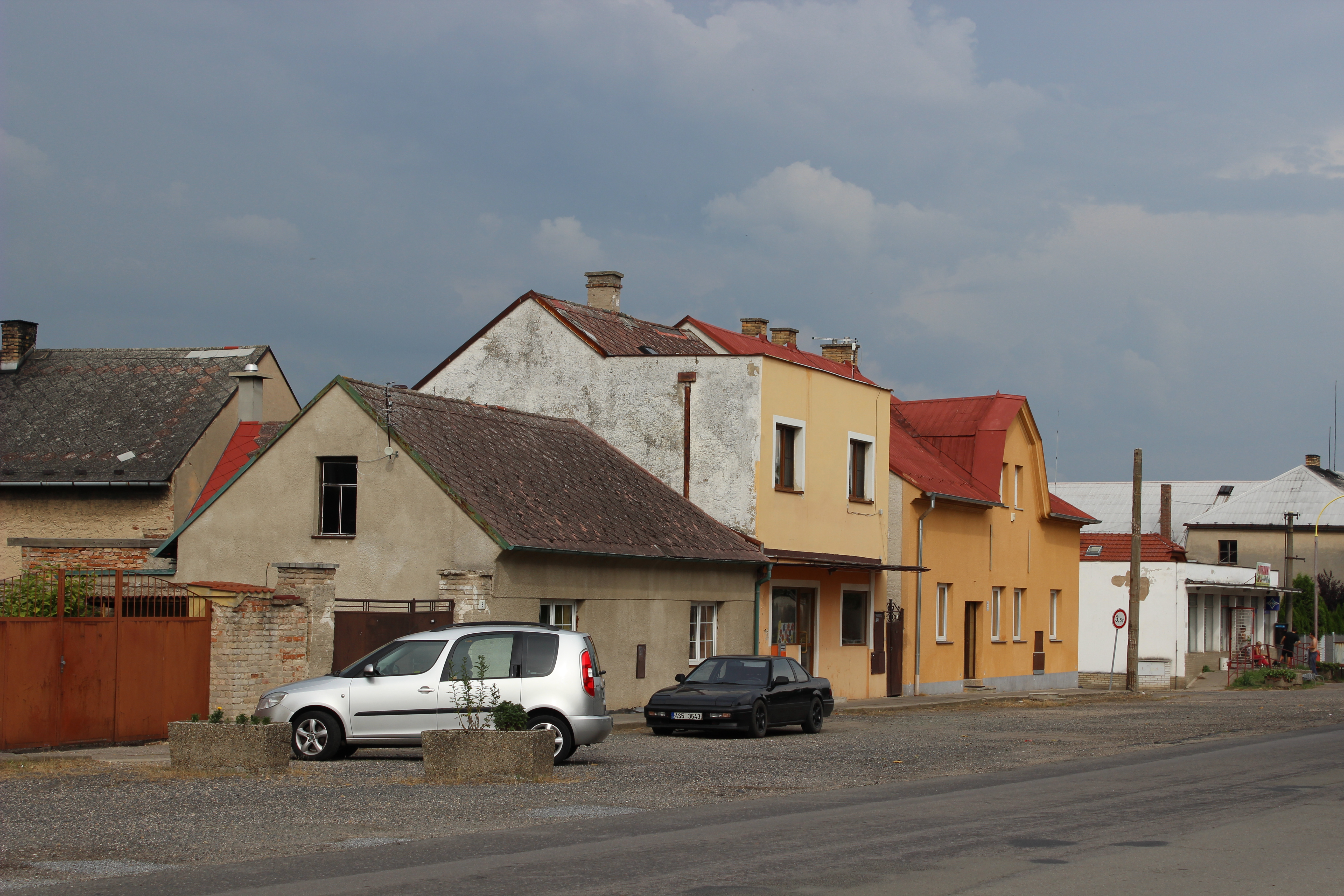 Zástavba severně od kostela podél silnice číslo II/272 ve Zdětíně v mladoboleslavském okrese.